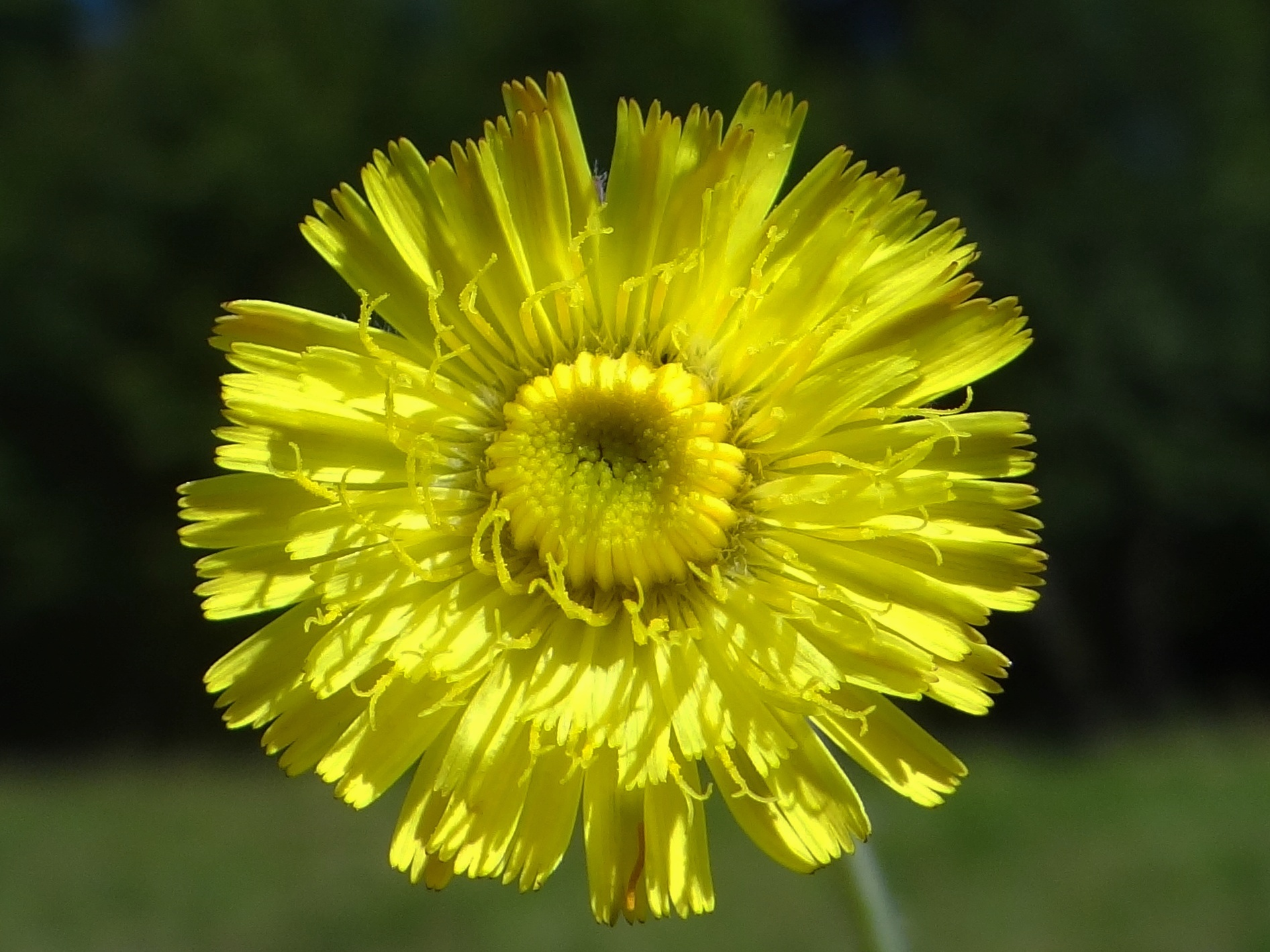 Hieracium pilosella